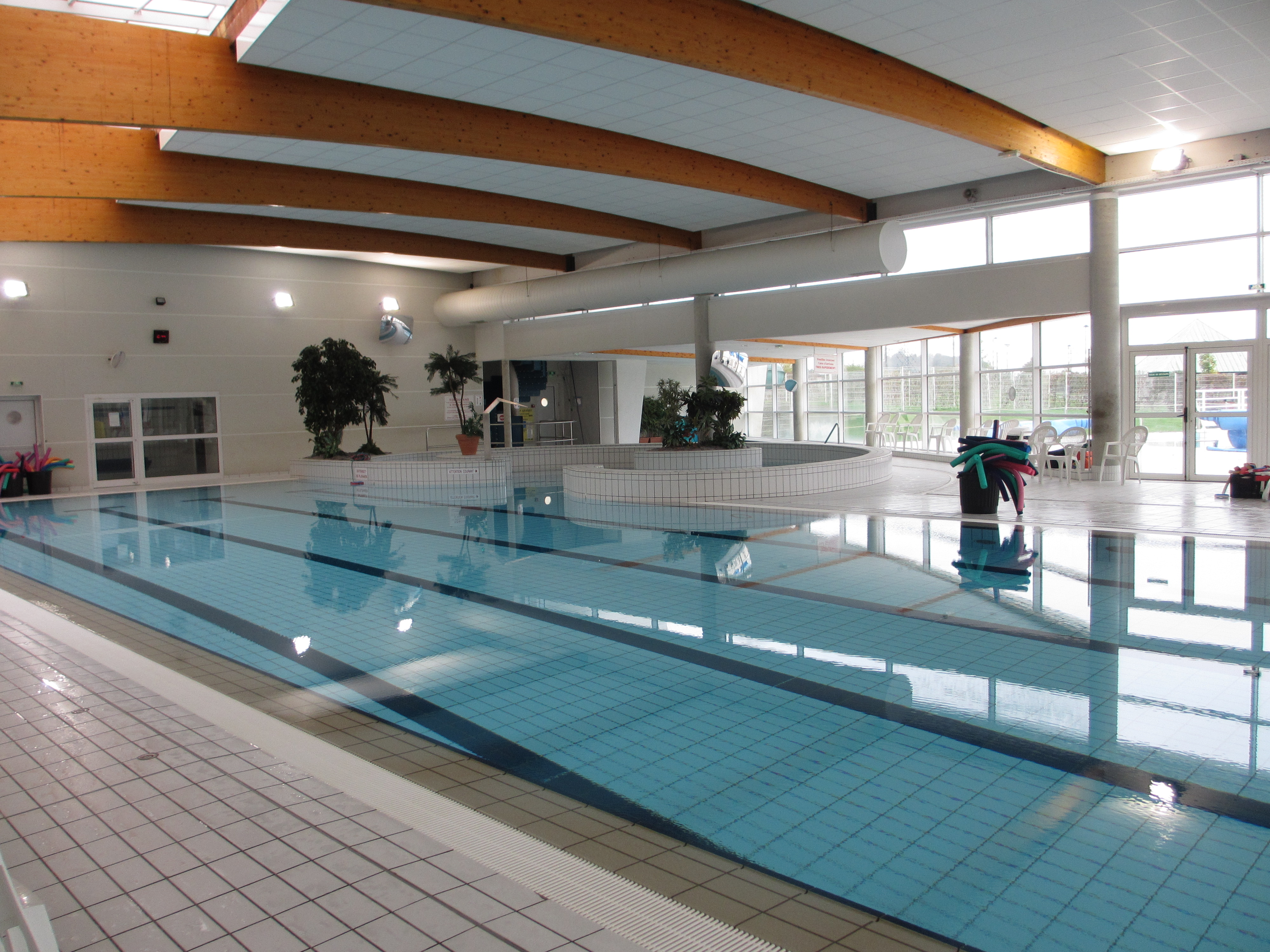 Espace aquatique Amphélia situé sur les bords de Loire